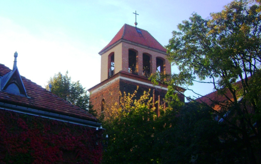 Kościół farny Podwyższenia Krzyża Świętego w Tczewie